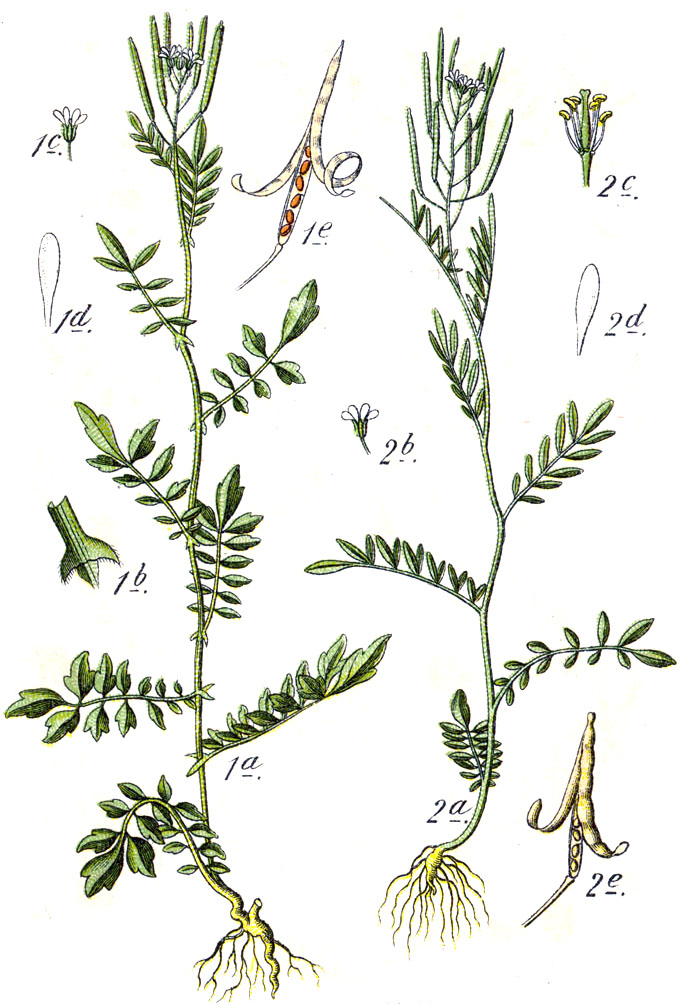 1. Cardamine impatiens subsp. impatiens, syn. Crucifera impatiens E.H.L.Krause 2. Cardamine parviflora L., syn. Crucifera parviflora E.H.L.Krause Original Caption 1. Spring-Waldkresse, Crucifera impatiens 2. Kleinblumiges Schaumkraut, C. parviflora